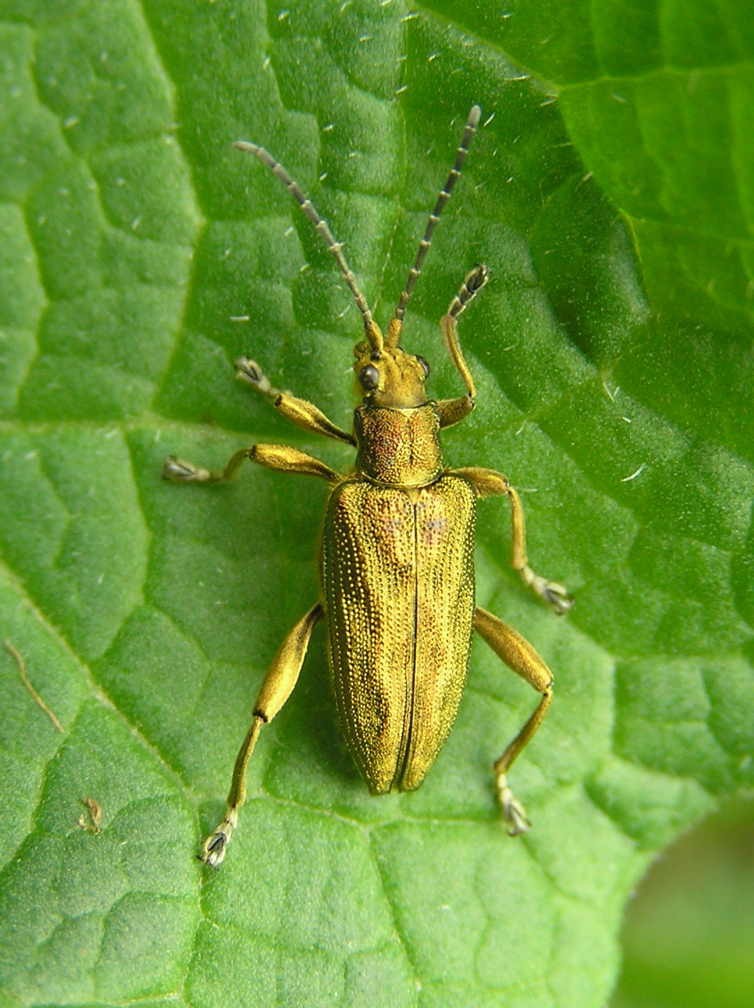 Plateumaris sericea, Brok, Polska